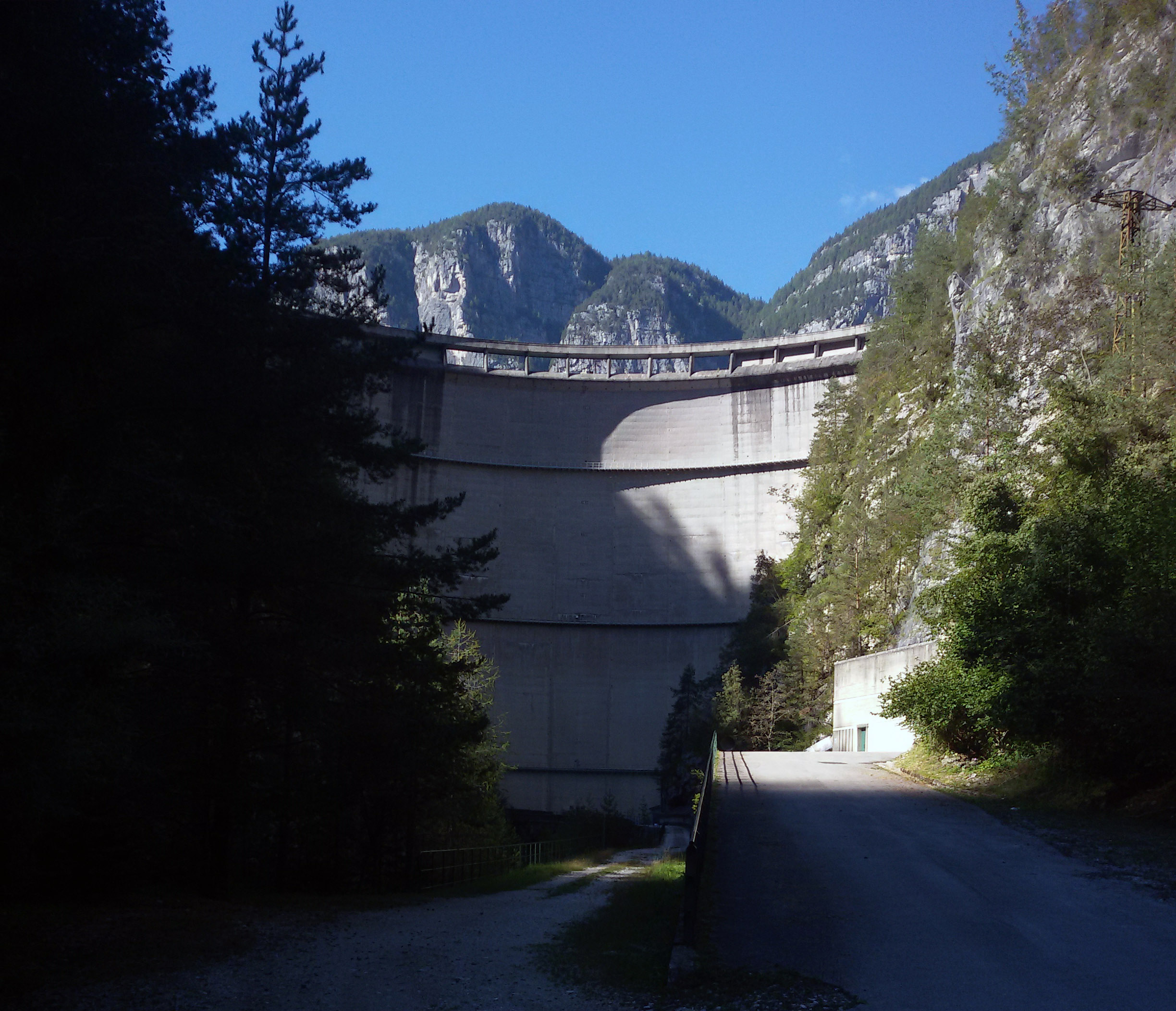 La diga di Pontesei di Zoldo, vista da valle. Semi nascosta sulla destra la facciata della centrale idroelettrica omonima